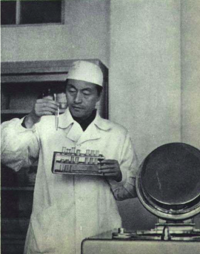 袁庆志，中华人民共和国农业学家